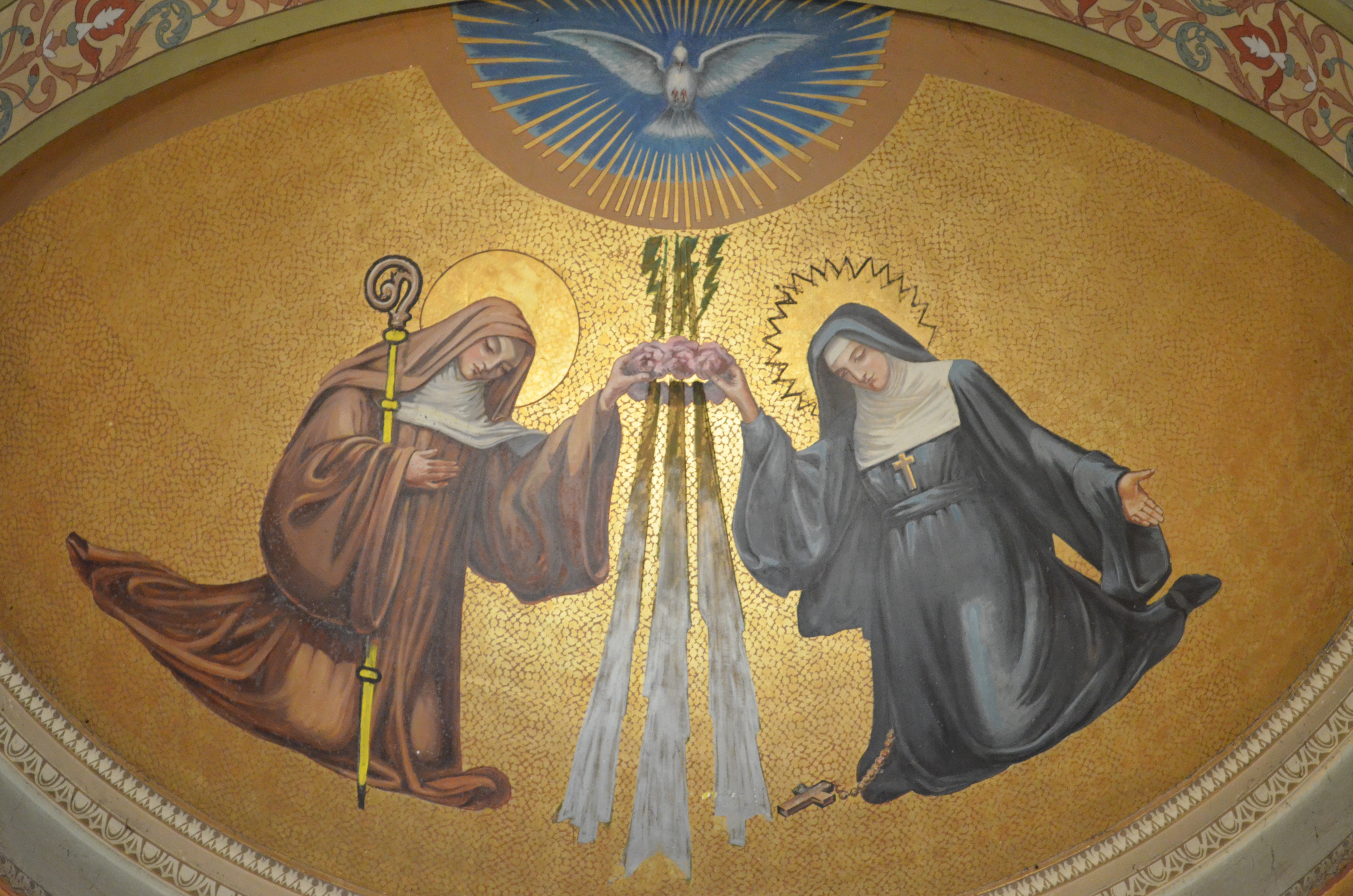 Église Saint-Louis, construite entre 1813 et 1830 - La Roche-sur-Yon .